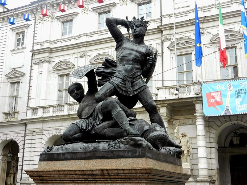 Torino - Monumento al Conte Verde in Piazza Palazzo di Città